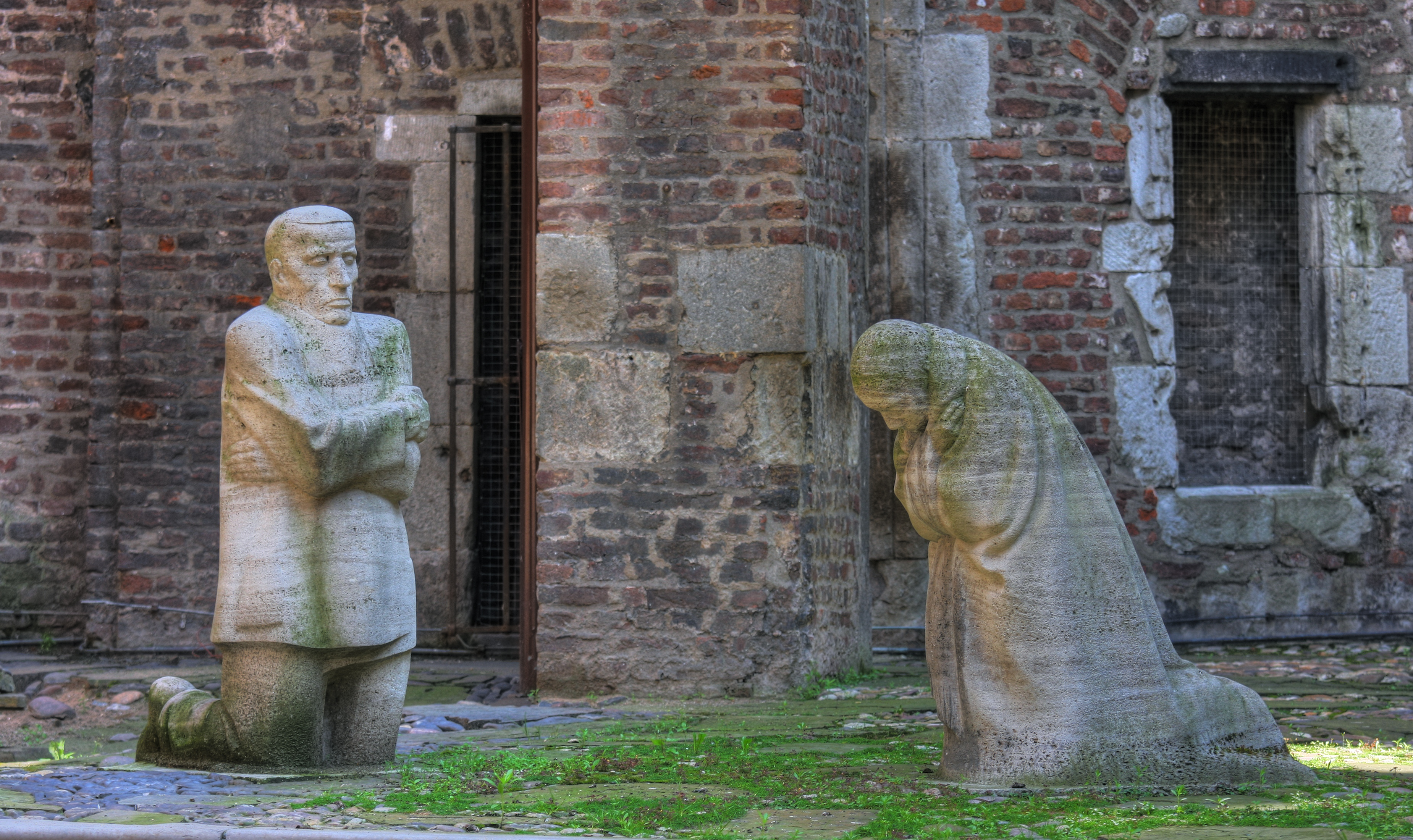 Vater und Mutter (Trauerndes Ehepaar)